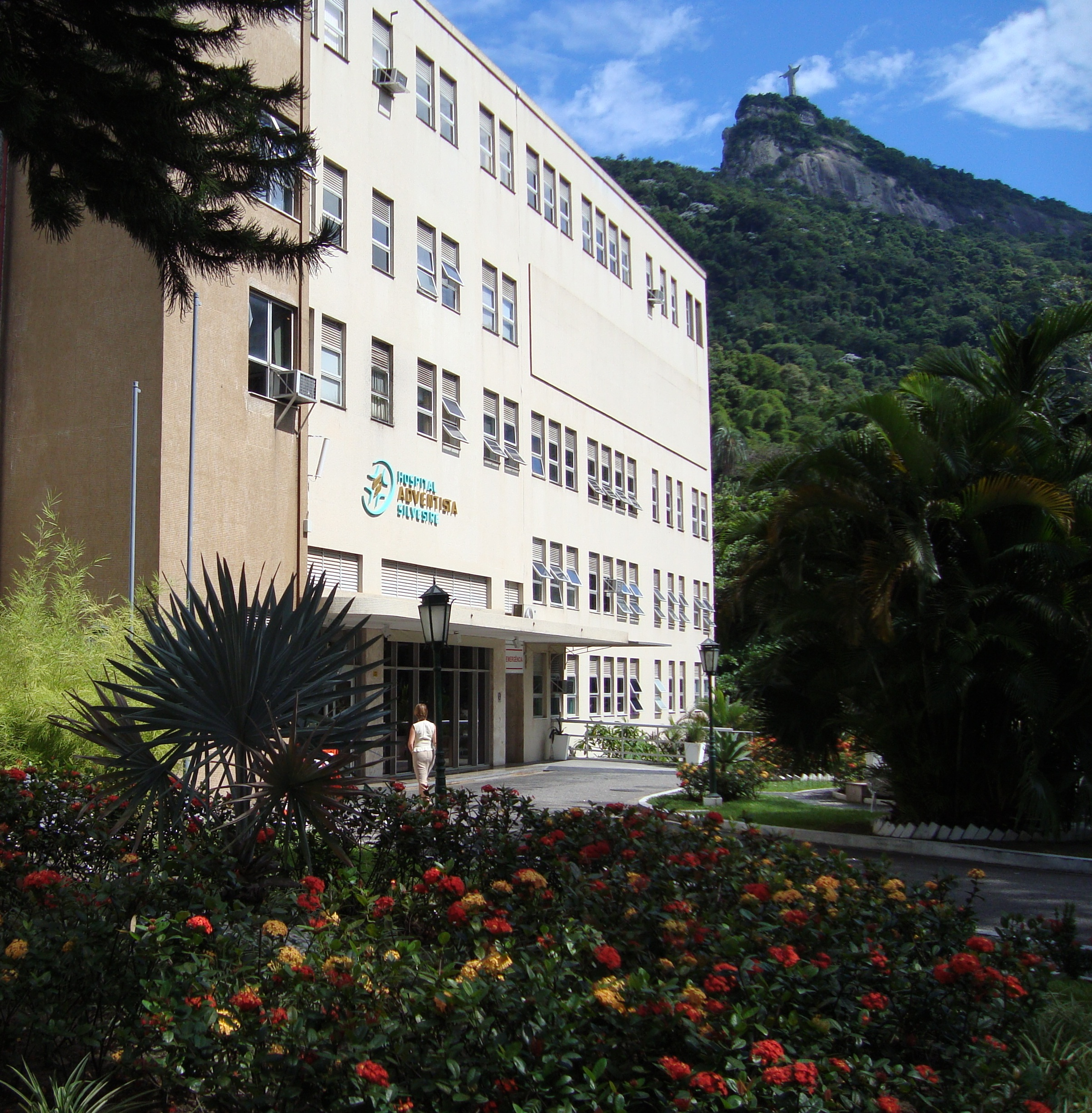 Foto da Fachada do Hospital Adventista Silvestre no Rio de Janeiro, ao fundo pode ser visto o monumento do Cristo Redentor.